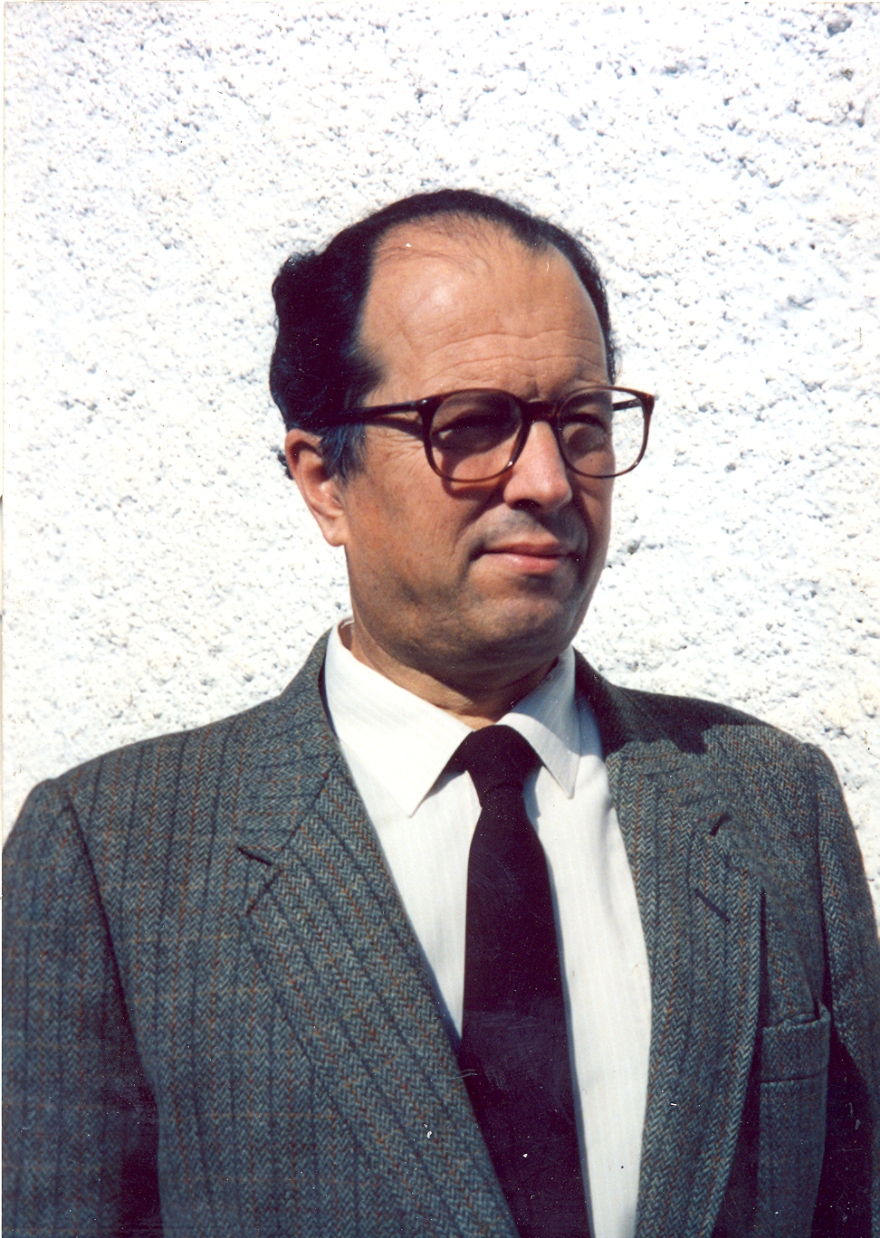 Fernando González Bernáldez, ecólogo español//spanish ecologist